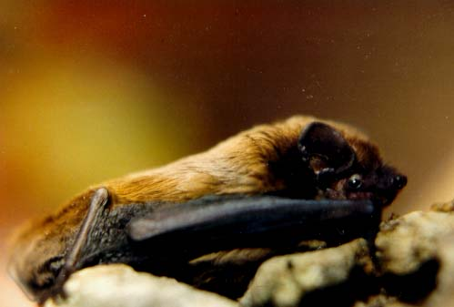 Nyctalus leisleri